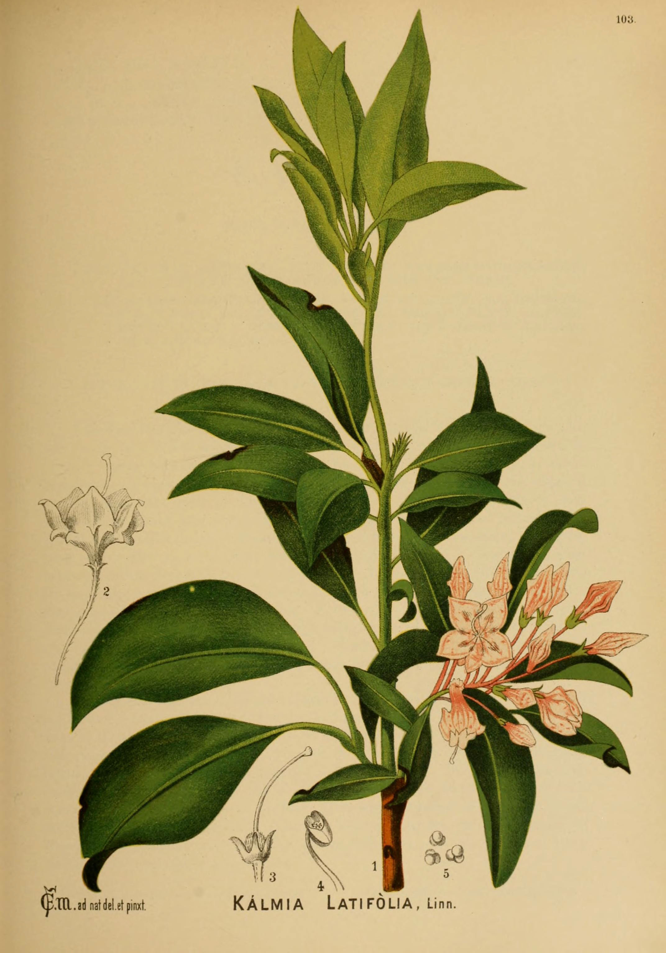 ATU.adnaldel.etpinxt. KALMIA LaTIFOLIA, Linn